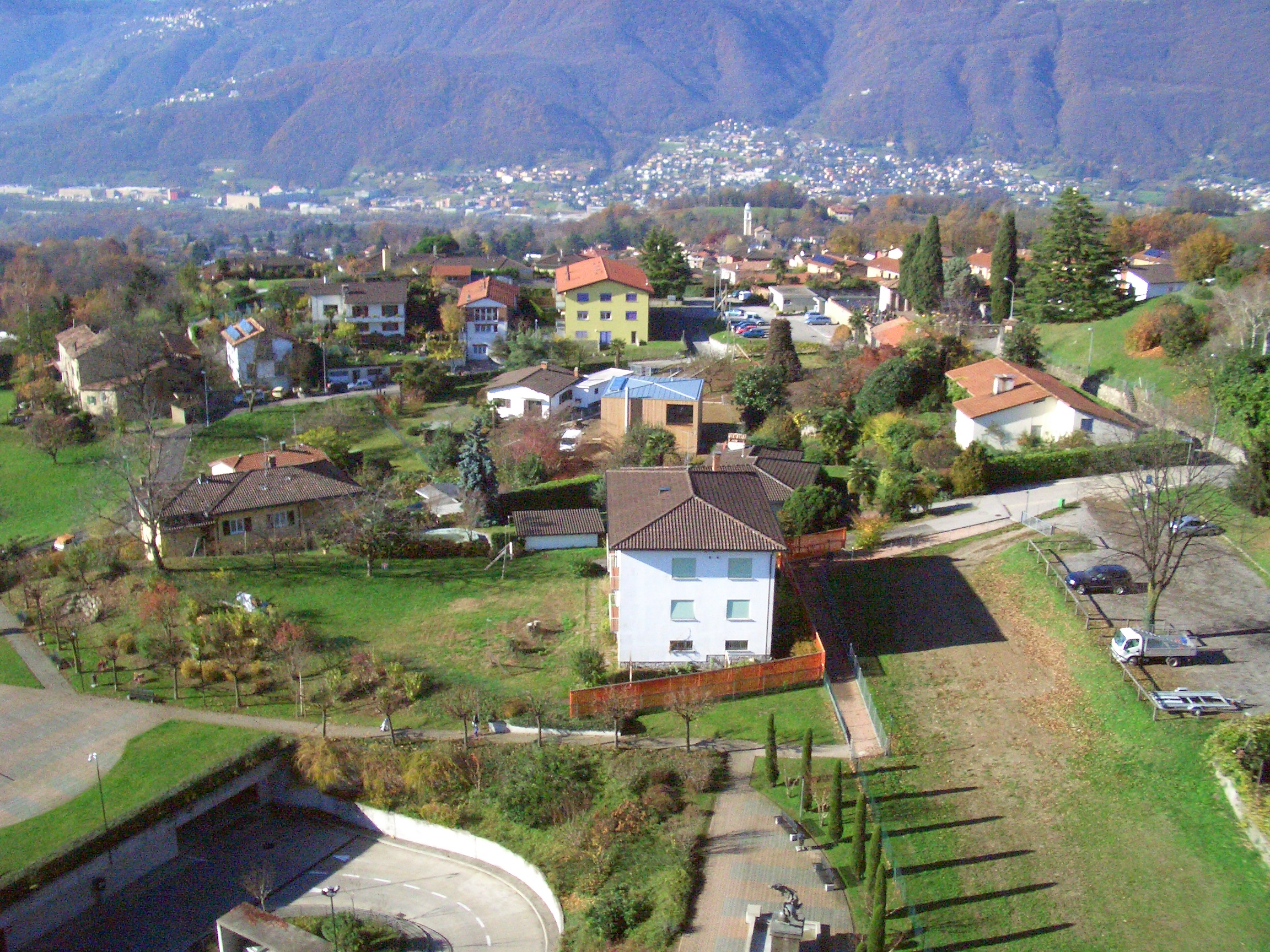 vista dal campanile verso il Vedeggio